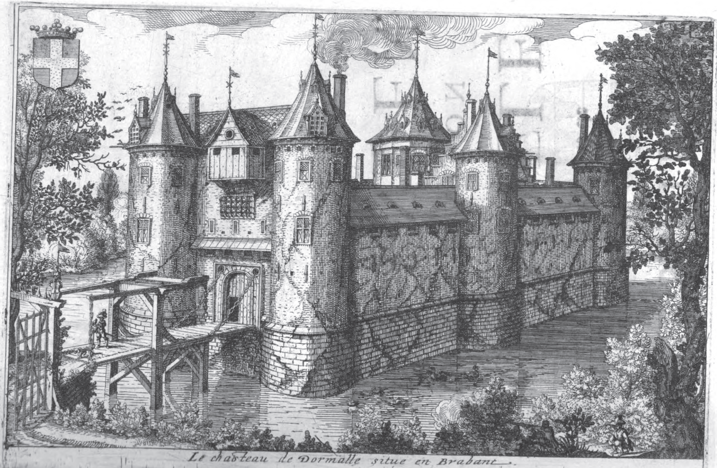 Chateau de Dormaele. Annales généalogiques de la Maison de Lynden. Christophe Butkens. Anvers, 1626.